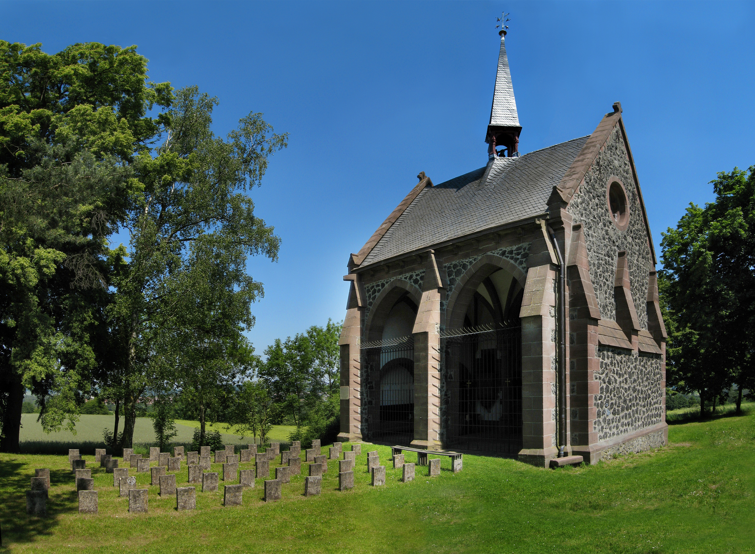 Magdalenen chapel Amöneburg.